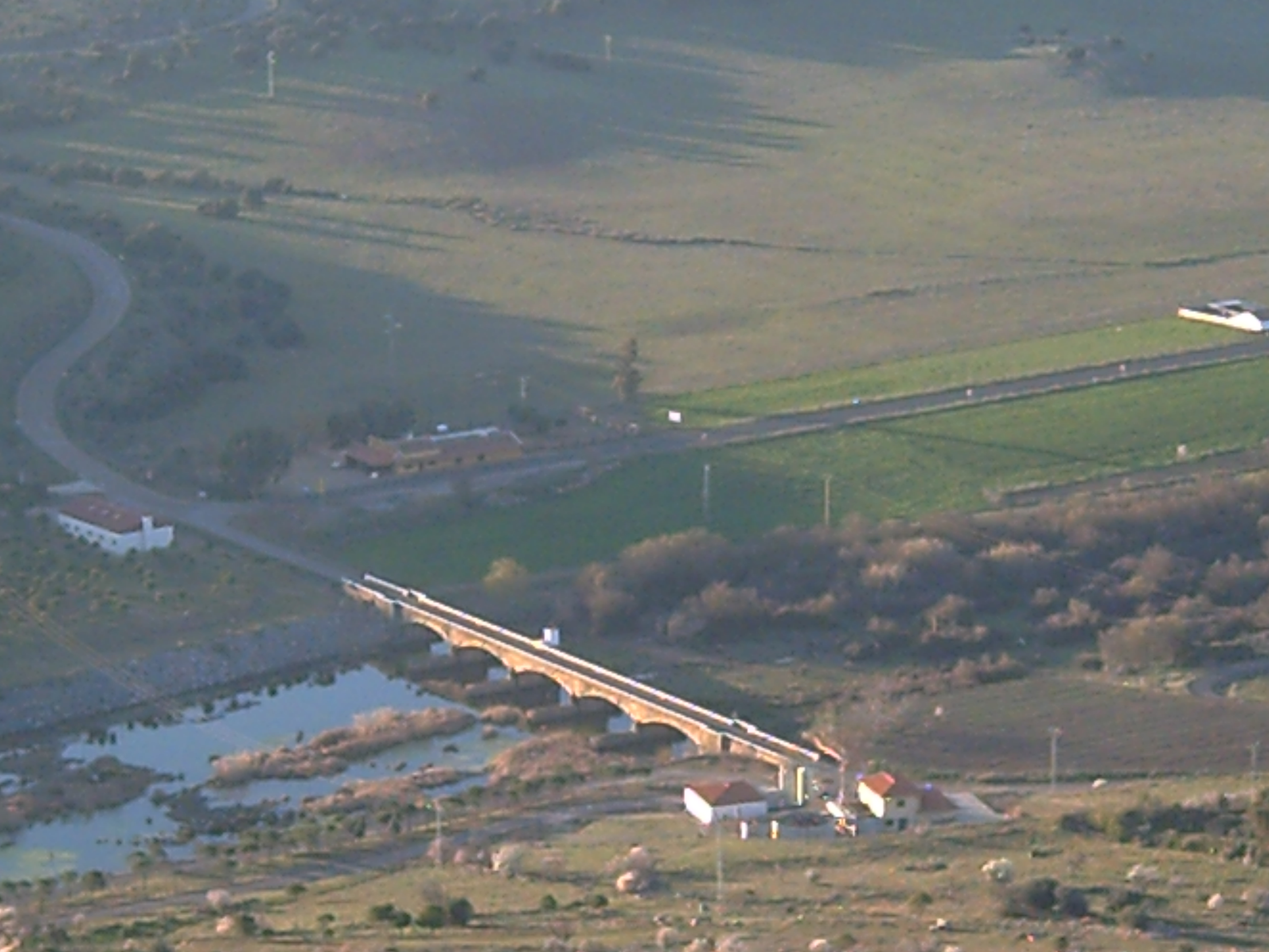 Vista e riu Matachel dendi el castillu d'Alanhi